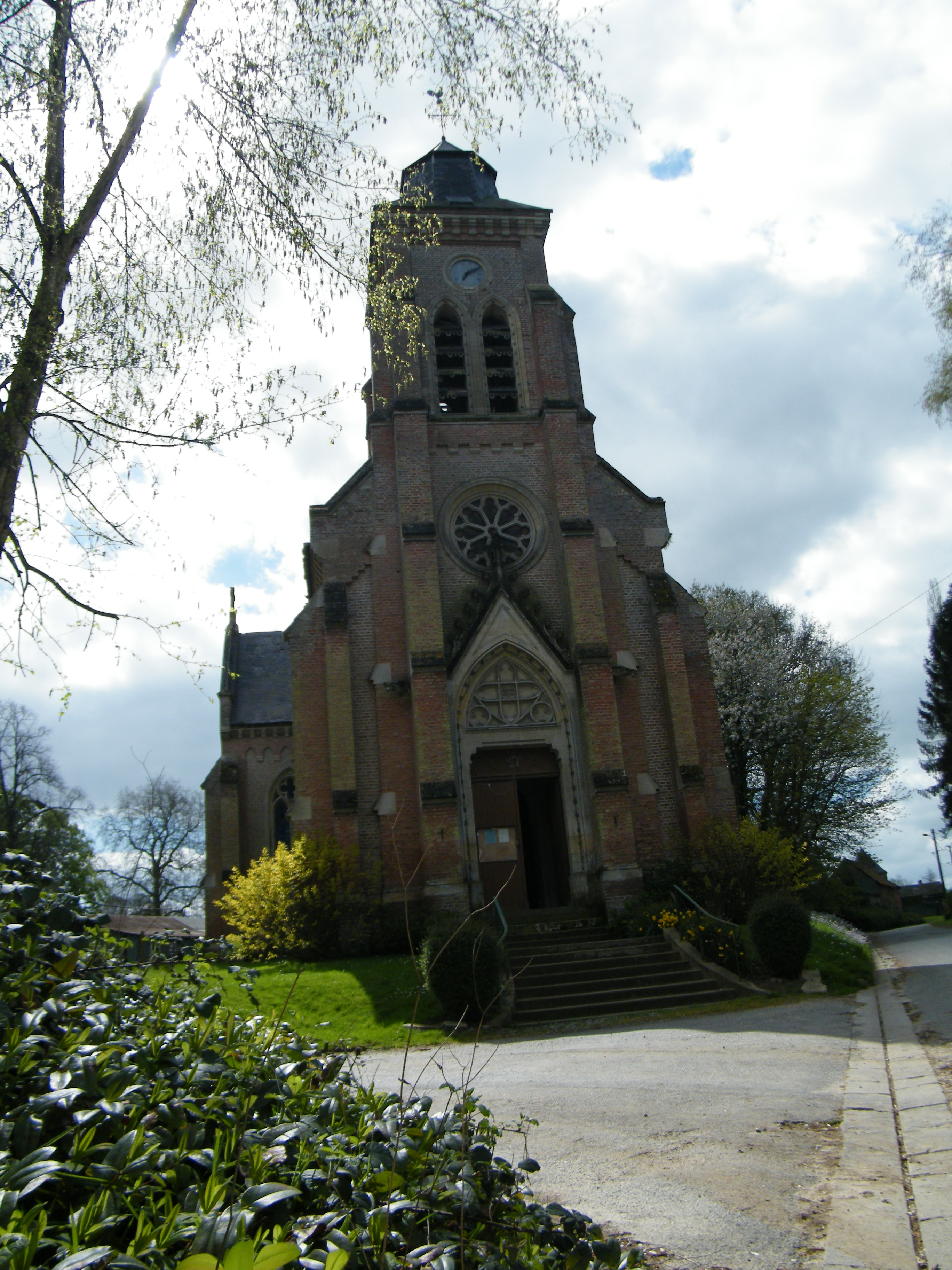 Le clocher.